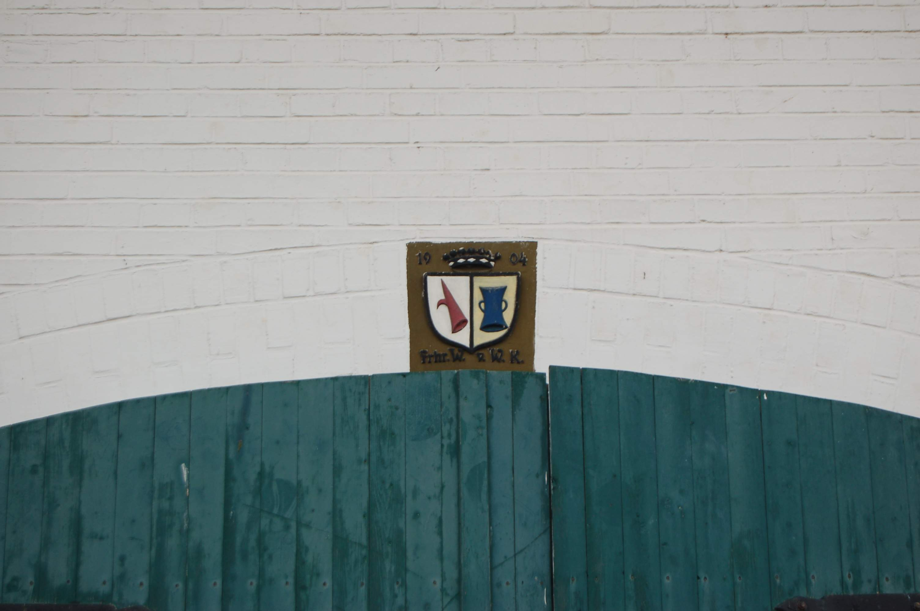 Wappen der Familie von Wintzingerode-Knorr über einem ehemaligen Wirtschaftsgebäude in Besenhausen